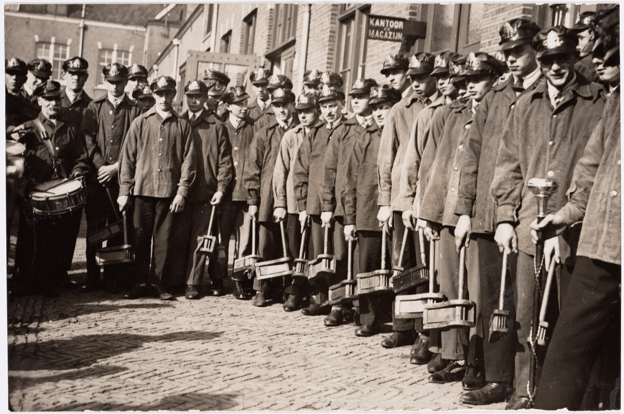 Beschrijving 50-jaar Stadsreiniging Ratelaars. Deze kondigden in de straten met hun ratel aan dat de vuilnis buiten gezet kon worden. Documenttype foto Vervaardiger Fotopersbureau Holland Collectie Collectie Stadsarchief Amsterdam: foto-afdrukken Datering 1927 Inventarissen Afbeeldingsbestand OSIM00008002883